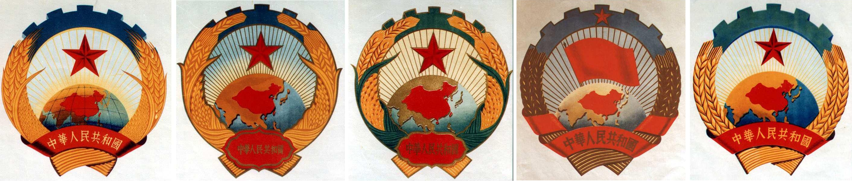 Draft of the National Emblem of People's Republic of China proposed by Central Academy of Fine Arts on September 1949.